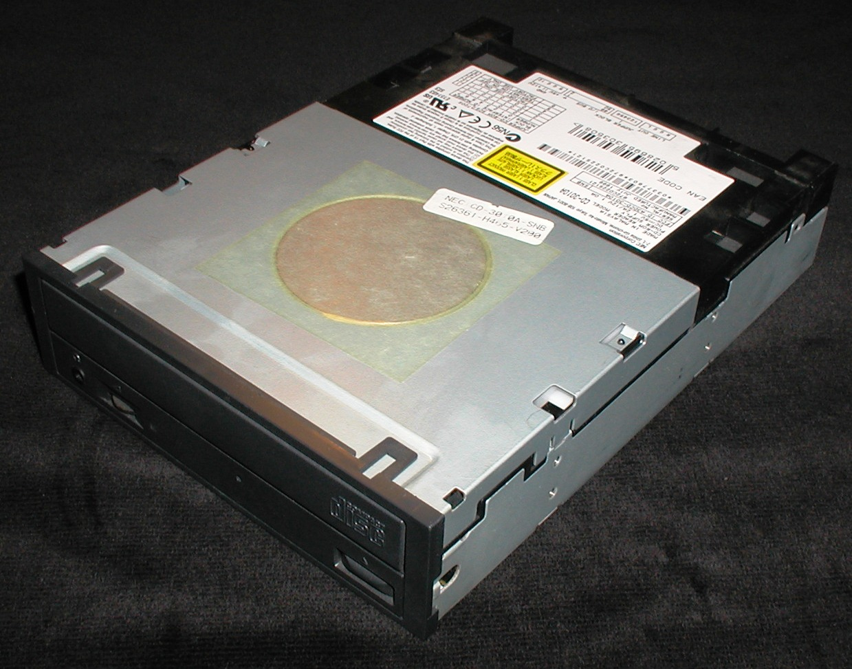 Internes SCSI CD-ROM-Laufwerk NEC CD-3010A-SNB.